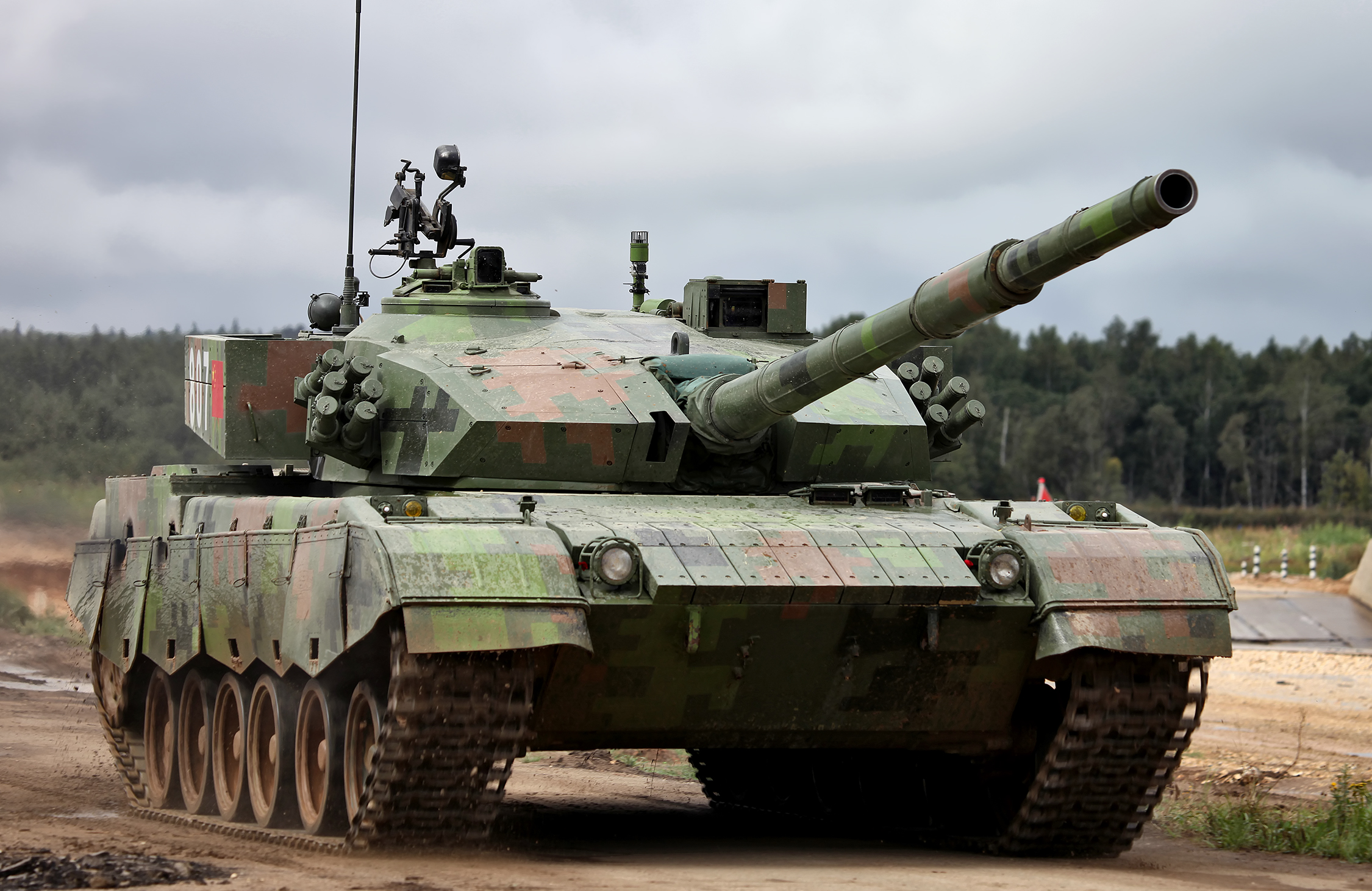 96A (ZTZ-96A)